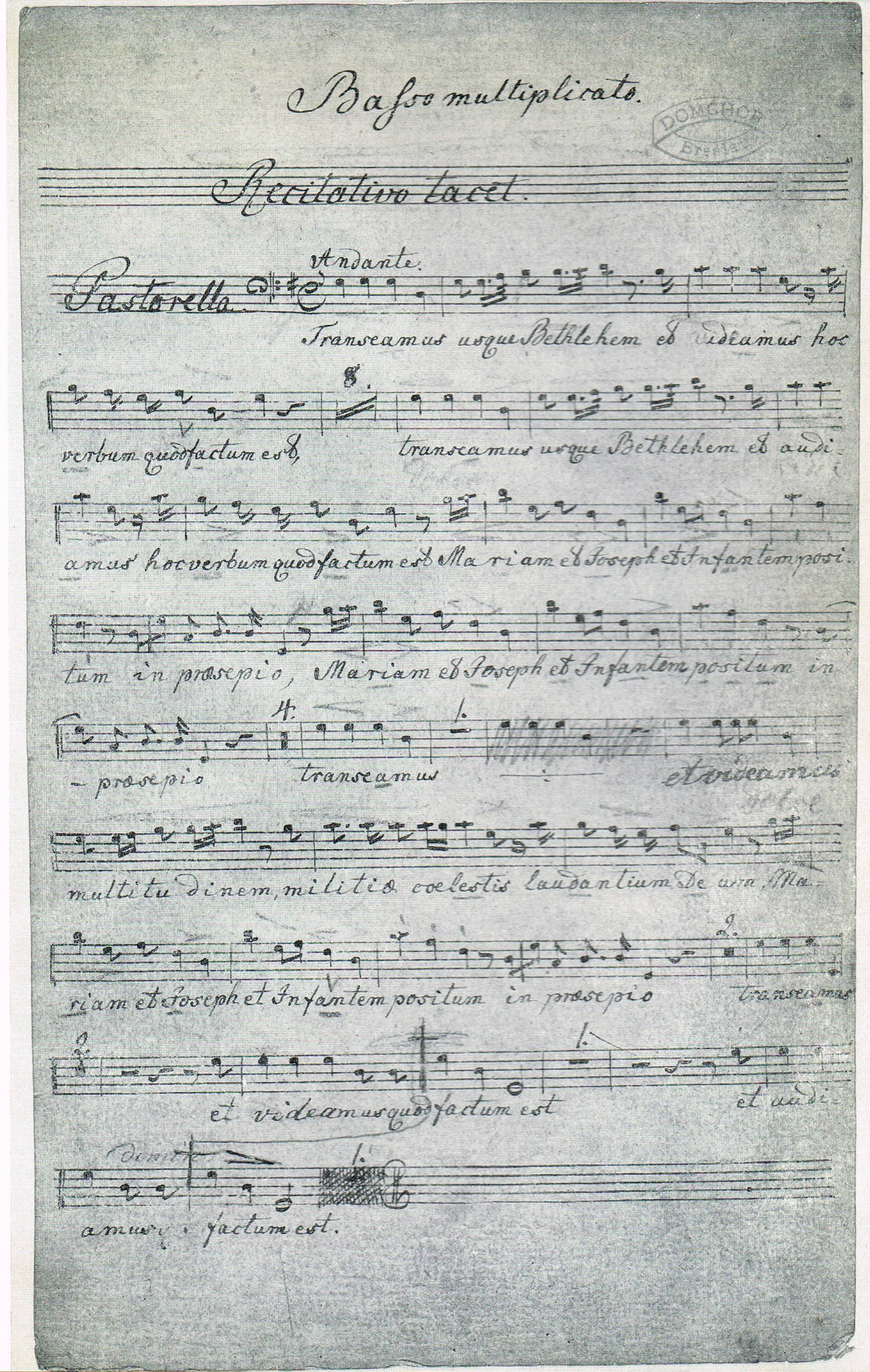 Transeamus. Basso multiplicato.